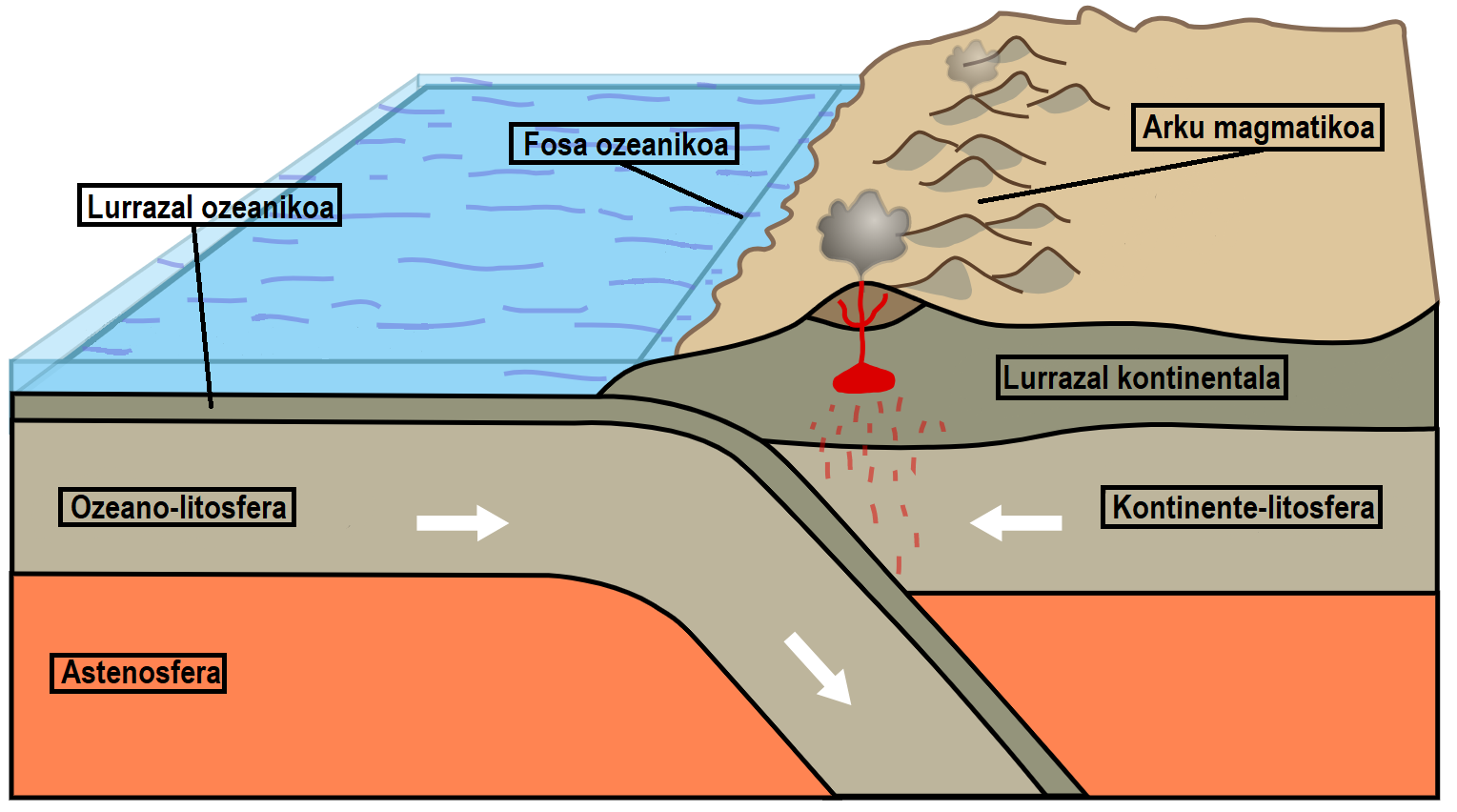 Bi plaka tektonikoen konbergentziaren eraginez sortutako ertz ezegonkorra